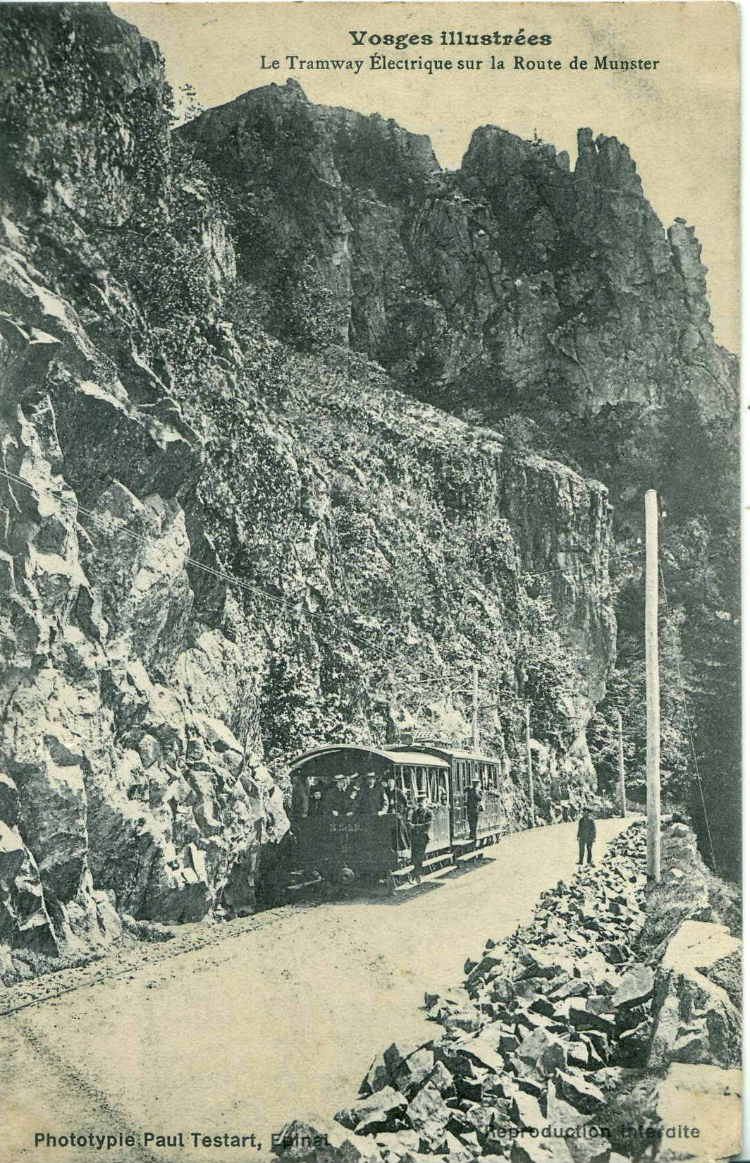 Carte postale ancienne éditée par Paul Testard, collection Vosges illustrées : Le tramway électrique sur la Route de Munster